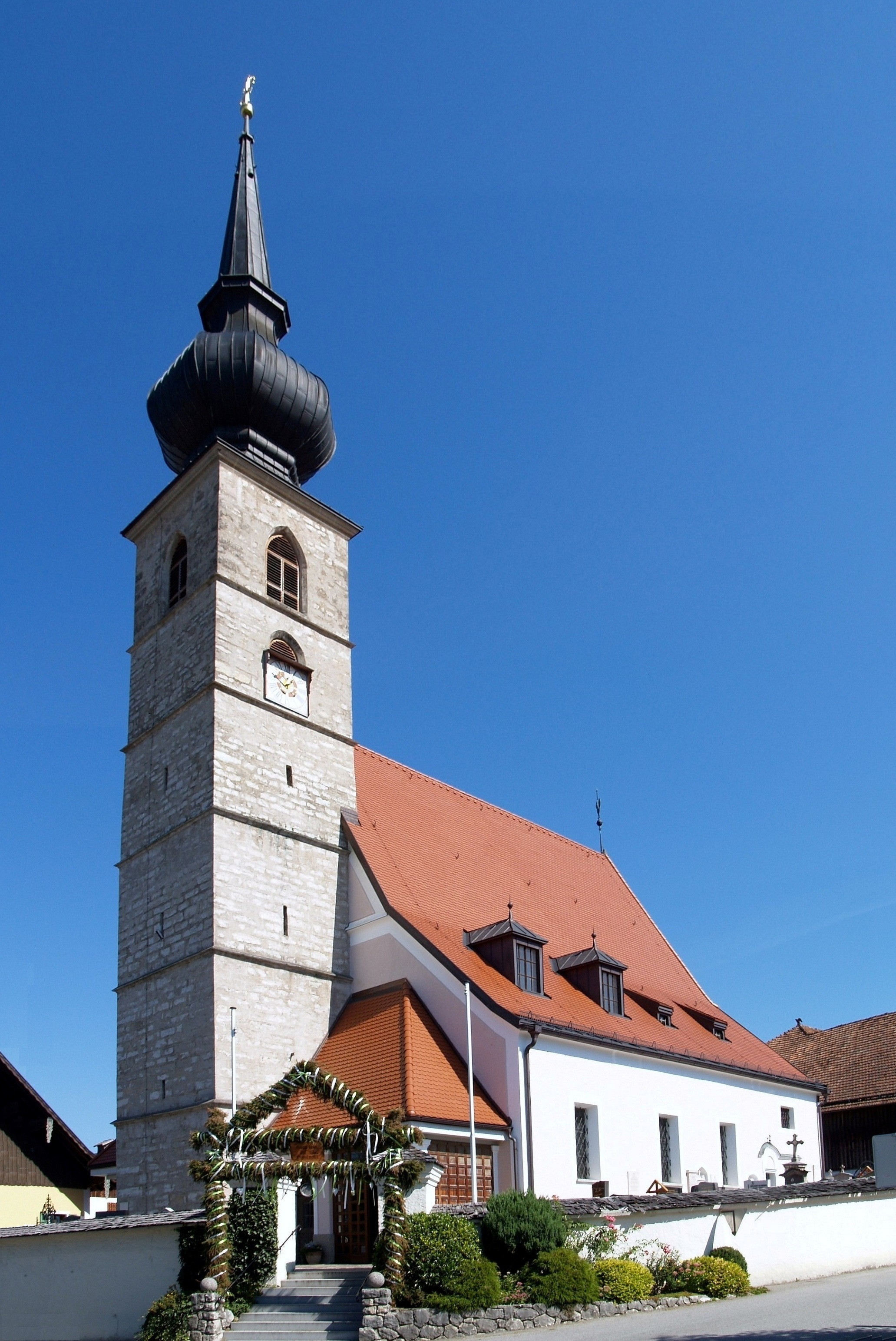 Nußdorf am Haunsberg, kath. Pfarrkirche St. Georg